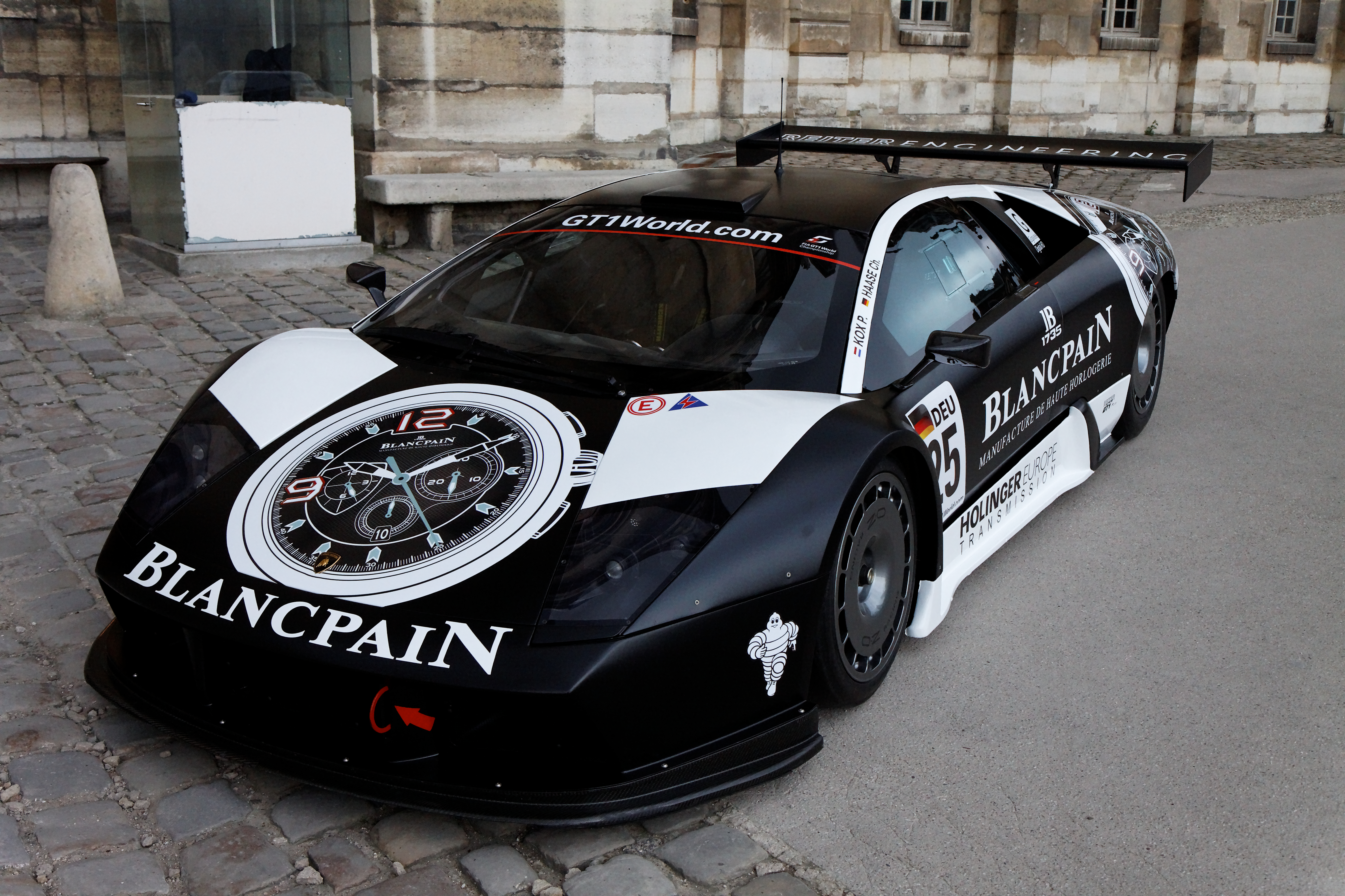 Photographie prise lors de la présentation du Blancpain Endurance series aux Invalides à Paris en mars 2011.